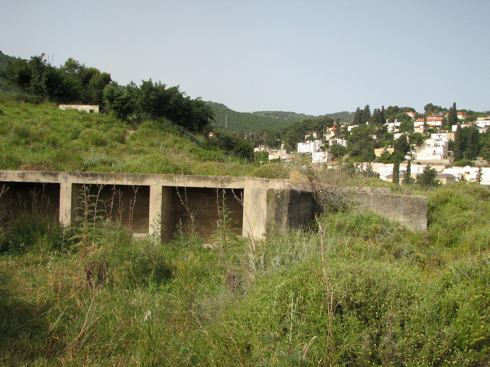 Nesher Old Quarry belongs to "Nesher Israel Cement Enterprise". Was opened on 1925 and closed on 1942. The quarry was reconstructed. Now in the city Nesher המחצבה הישנה של נשר מפעלי מלט ישראליים נפתחה בשנת 1925 ונסגרה בשנת 1942 לאחר שמקורות אבן הסיד התדלדלו. המחצבה עברה שיקום המשך השנים. בטח המחצבה מספר בארות ששימשו את בית החרושת ואת היישוב נשר בשנותיו הראשונות ביצורים מתקופת המנדט הבריטי ברקע שכונת גבעת נשר